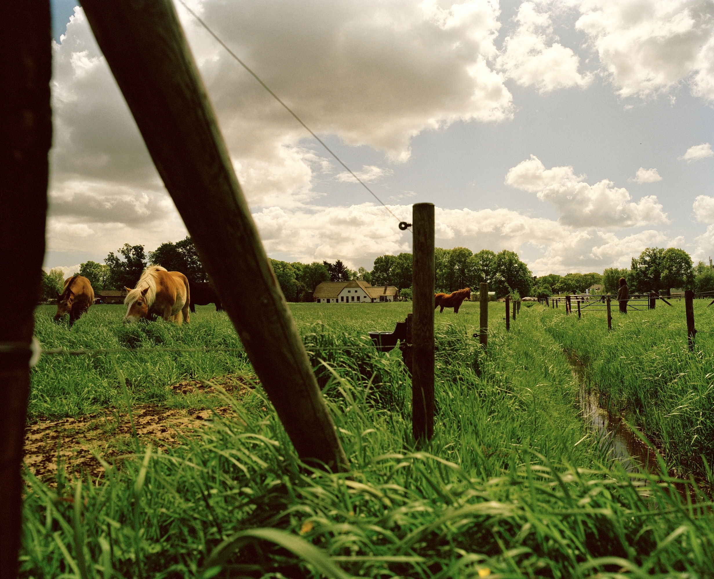 Afbeelding vanuit de weide met 2 paarden van De Paardenkamp